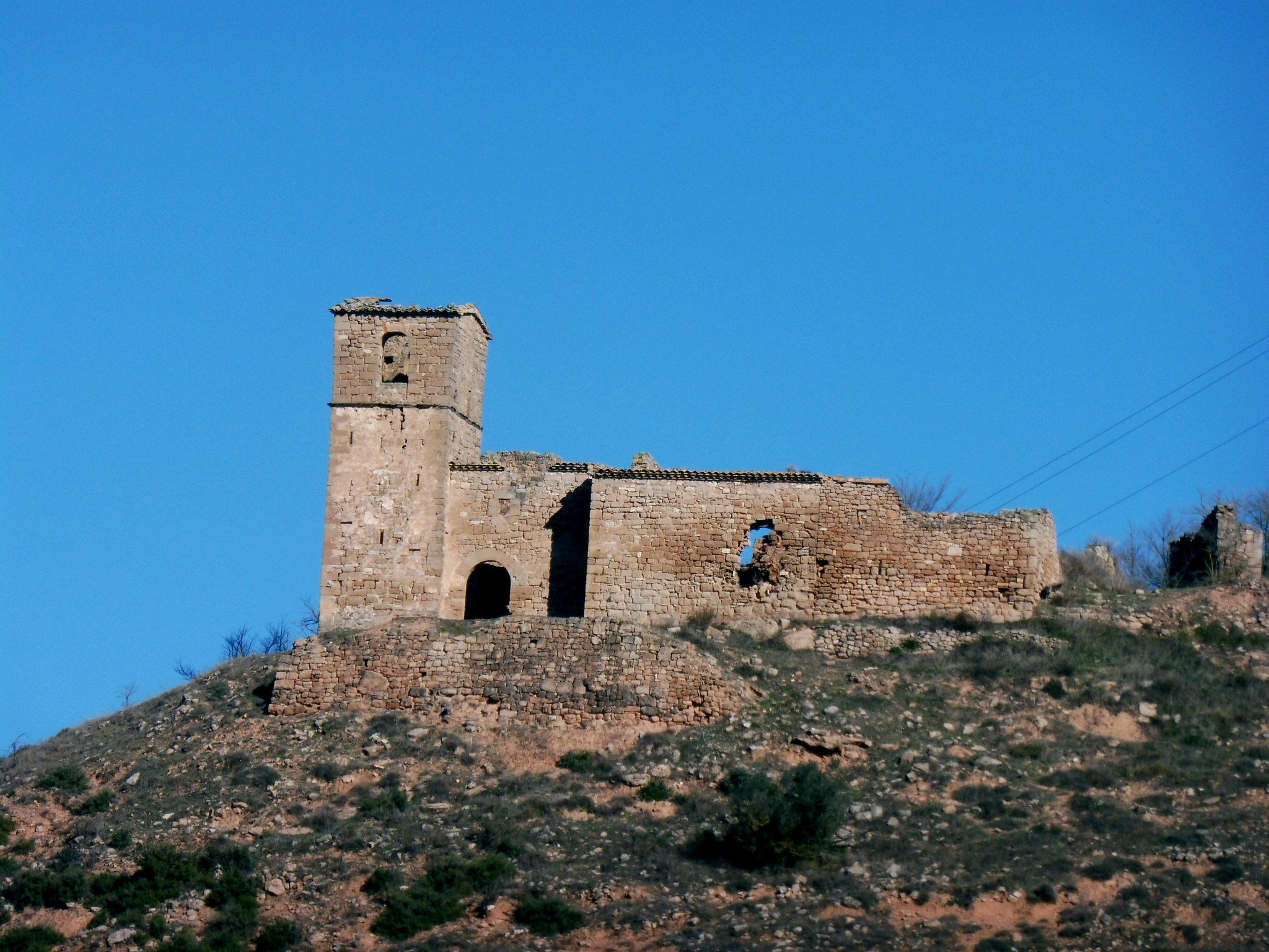 Església parroquial de Sant Salvador de Miralles (Veciana): des del camí del Lloret